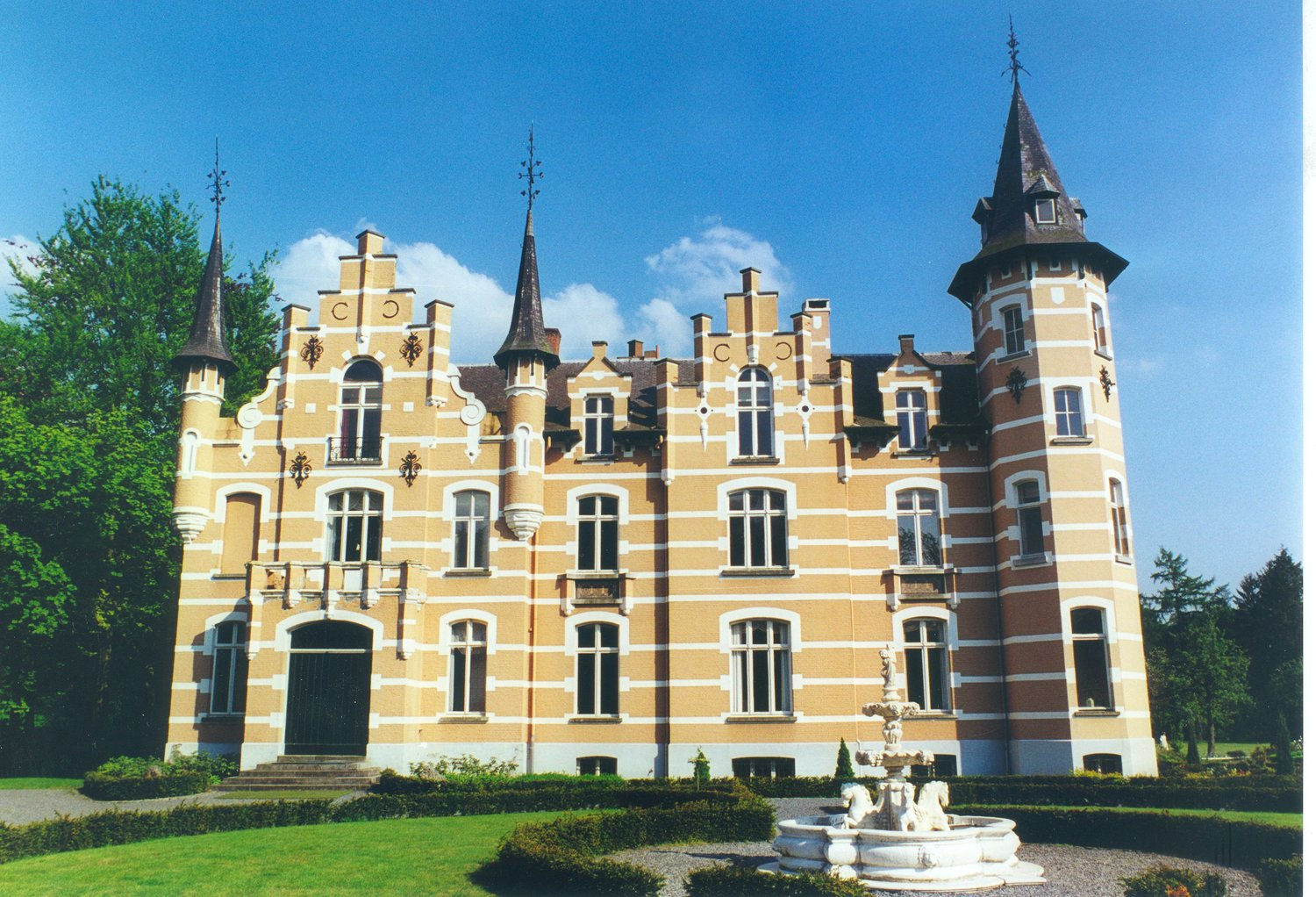 Hamont-Achel Catharinadal 3